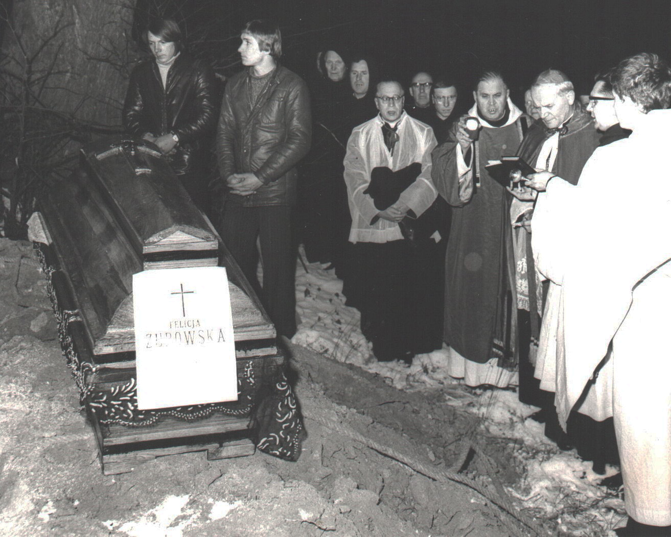 Pogrzeb Felicji Żurowskiej w Tyńcu 1977 r. Kondukt prowadził kard. Karol Wojtyła.